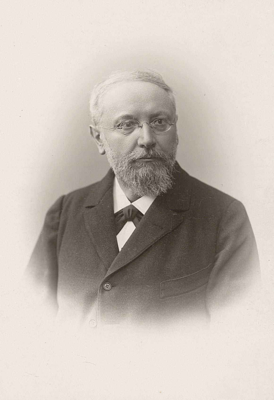 Foto von Karl von Steiff